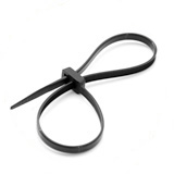 Doppelkopf Kabelbinder